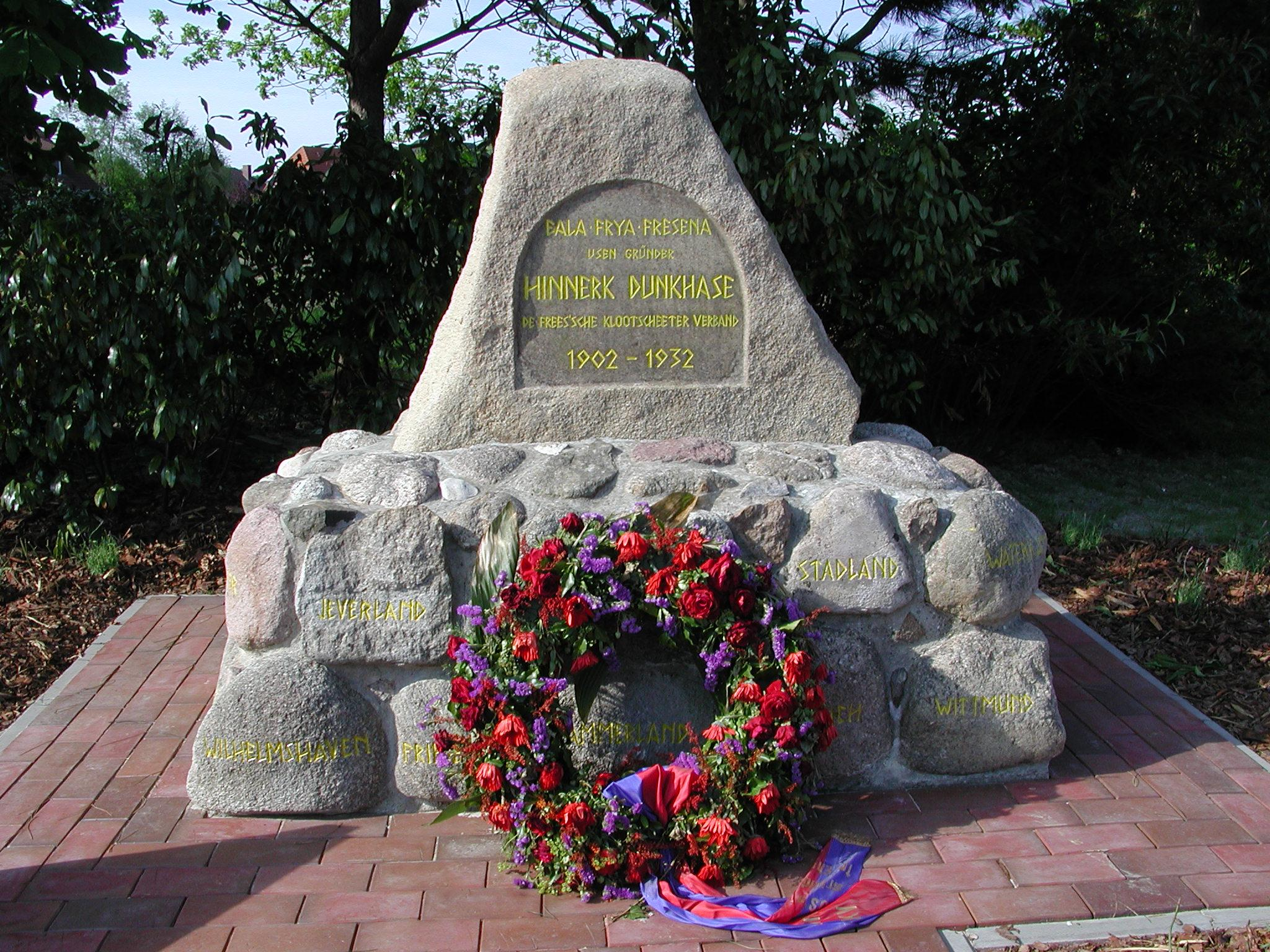 Denkmal für den Gründer des Friesischen Klootschießerverbandes (FKV), Hinrich (Hinnerk) Dunkhase, in Butjadingen-Burhave.